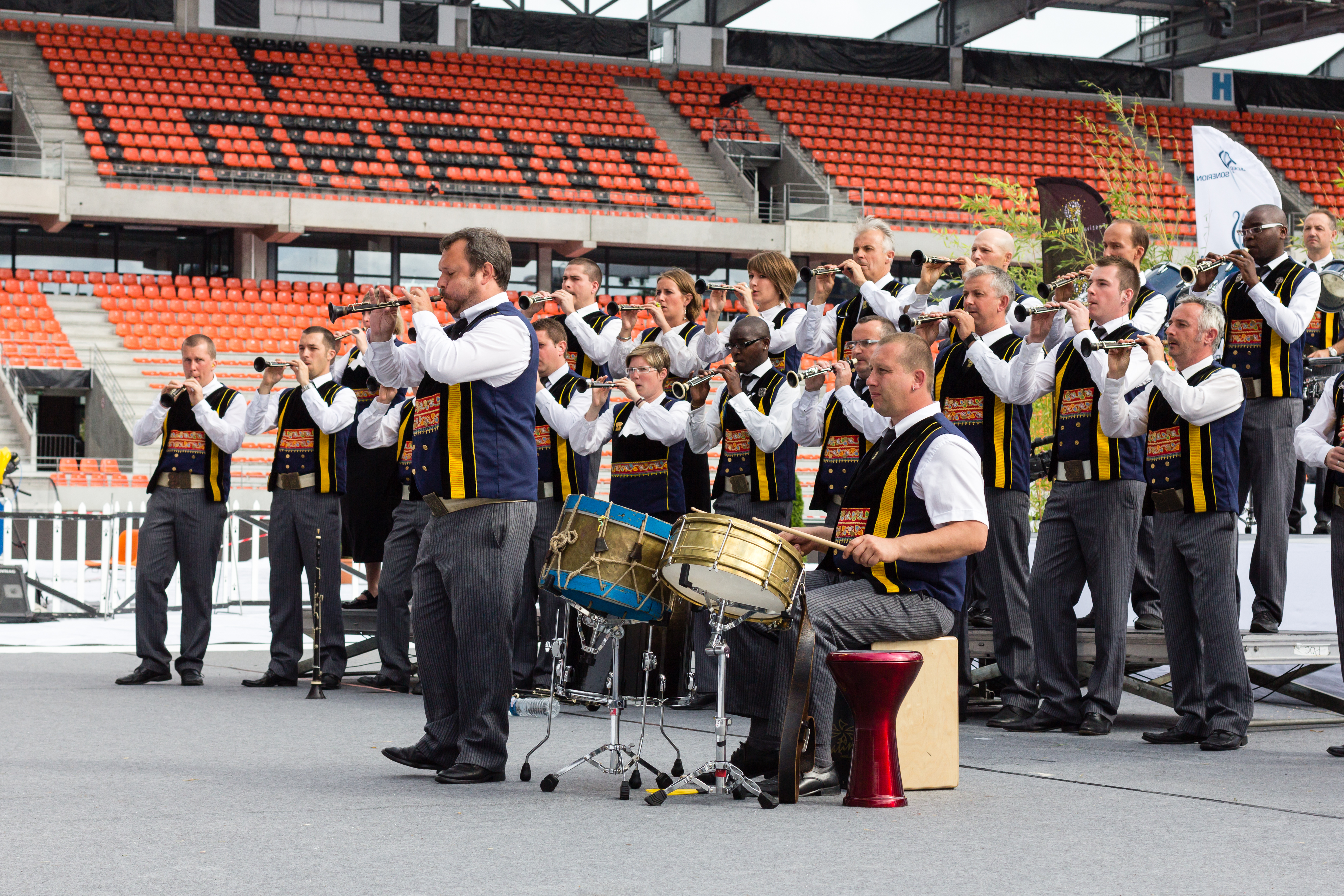 Le bagad Kemper lors du championnat national des bagadoù (première catégorie) au FIL 2012.